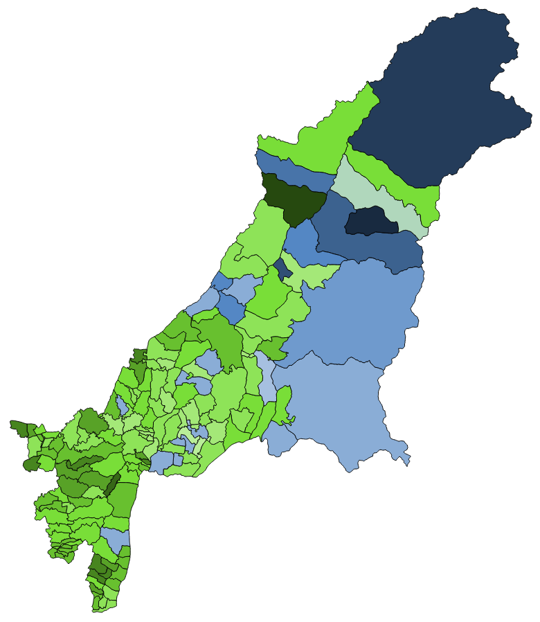 中文（台灣）: 顏色對照表